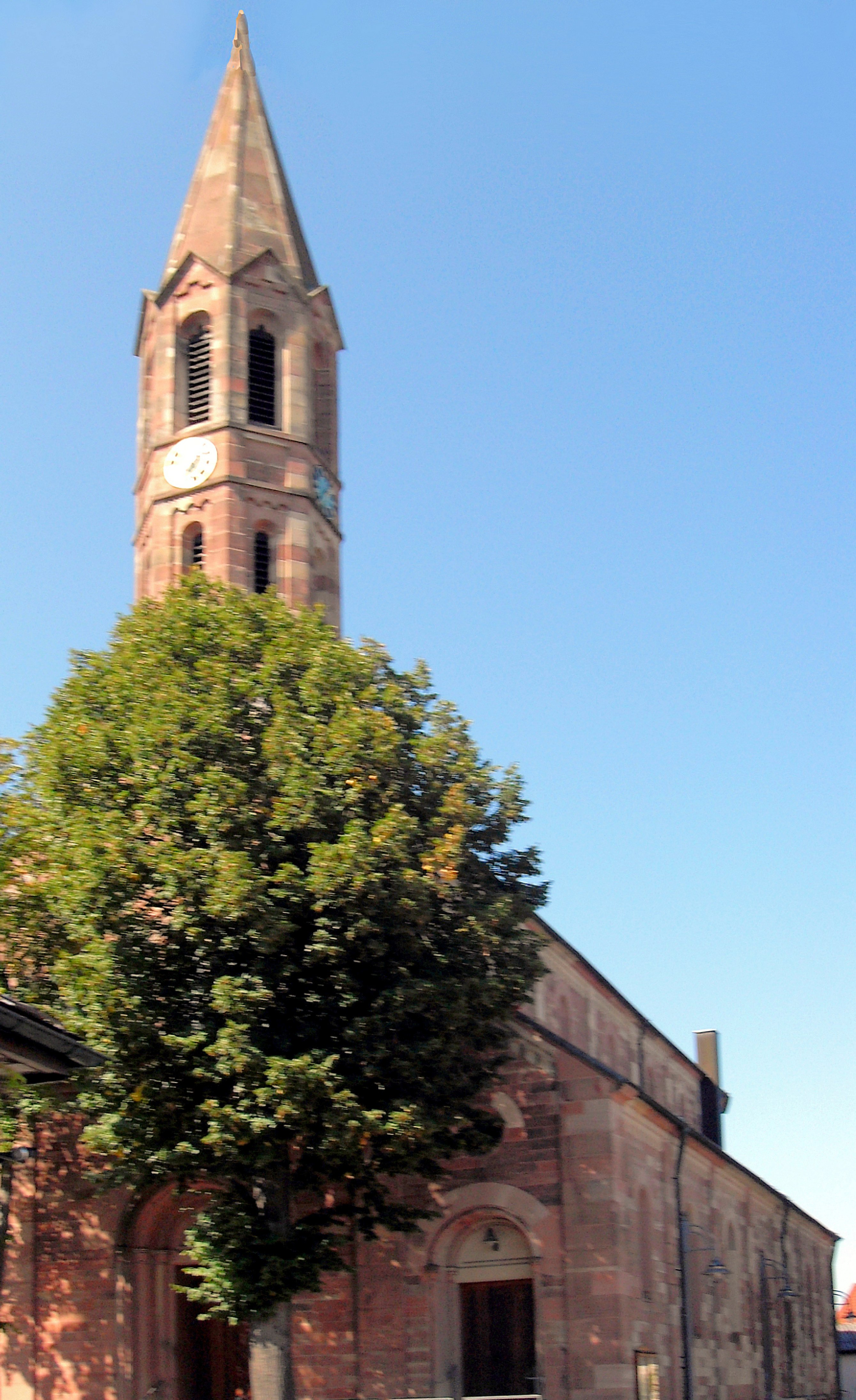 Kirche St. Laurentius in Hügelsheim